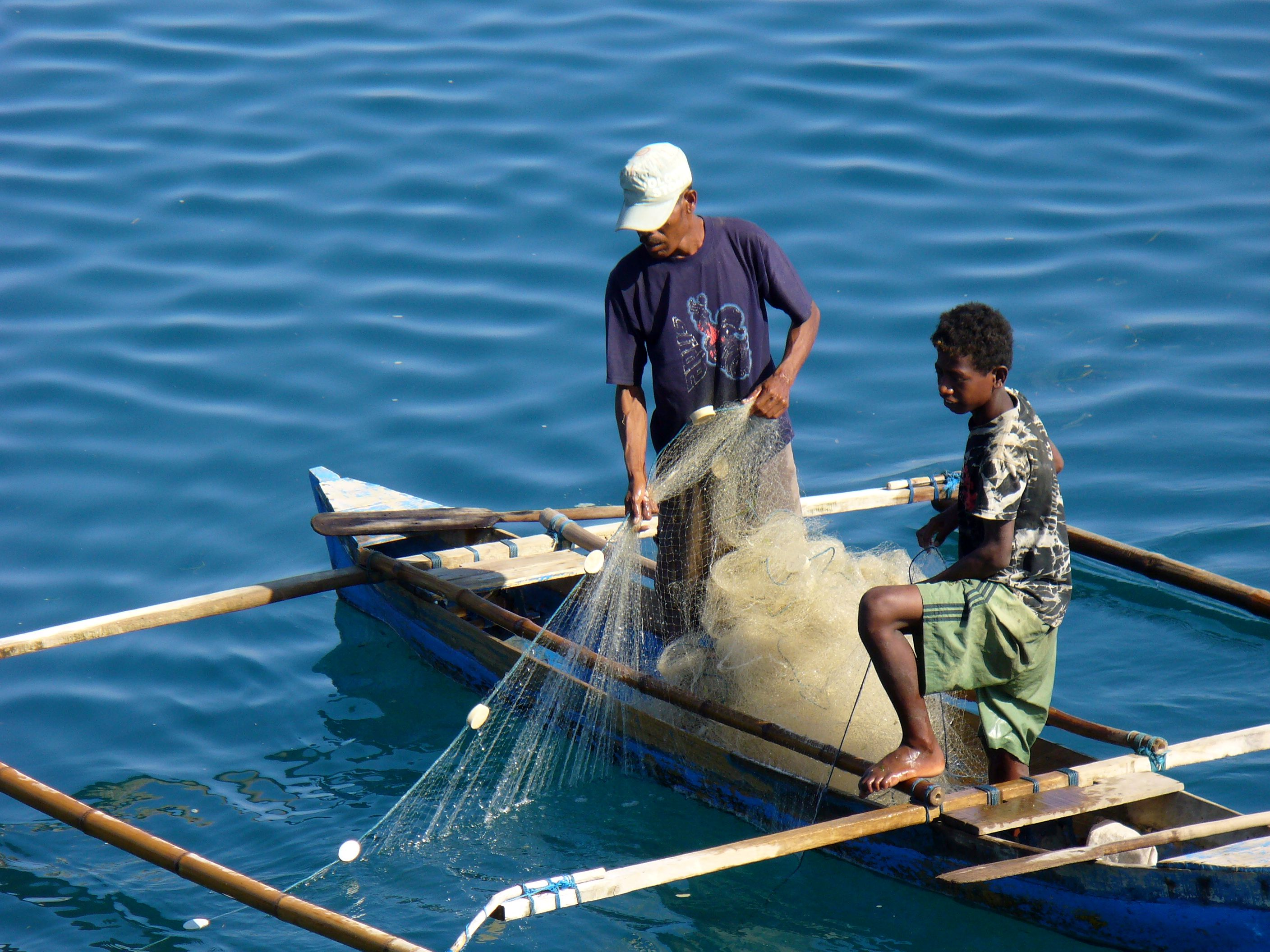 Dili, East Timor